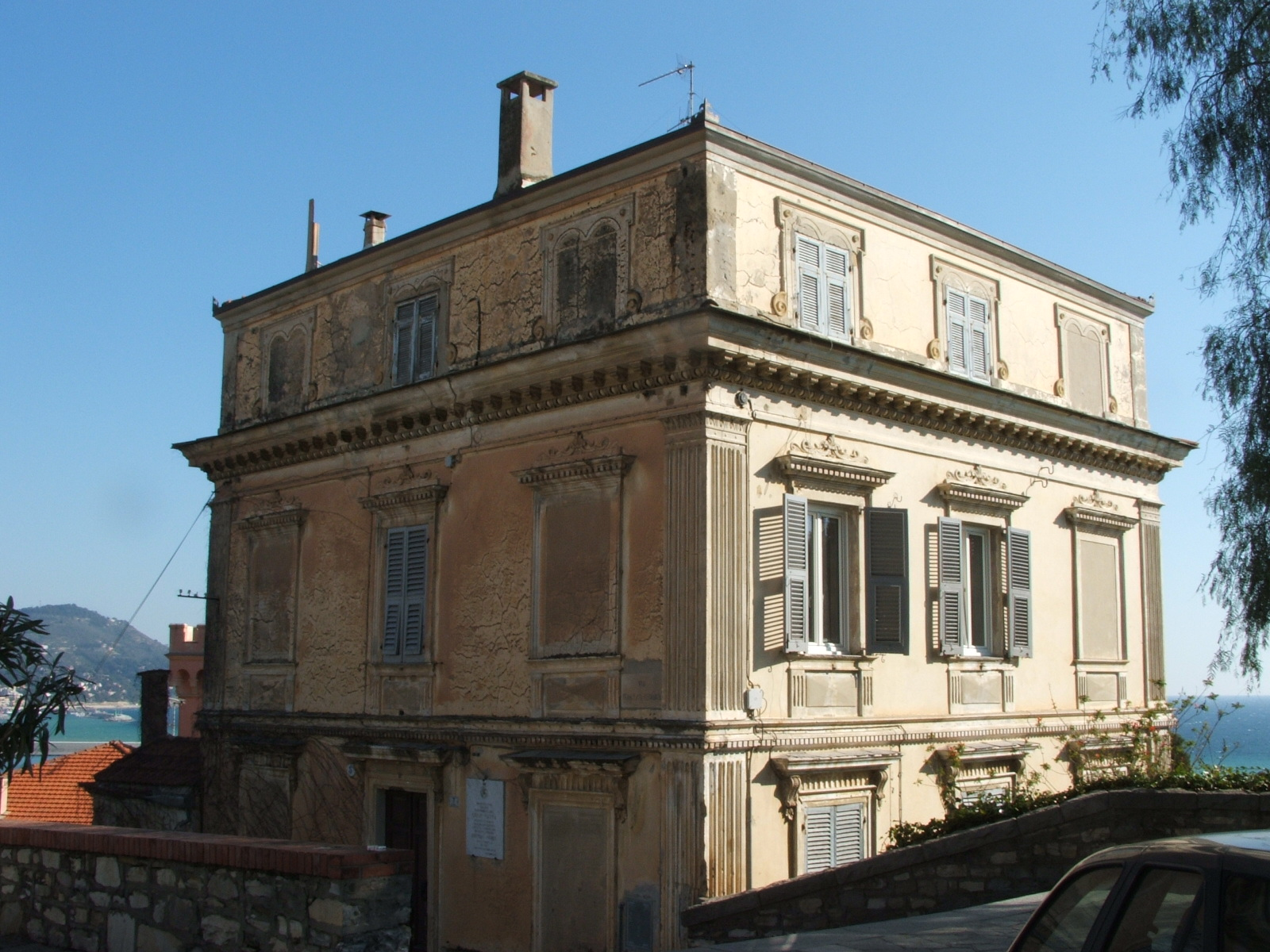 Immagine da Imperia Casa natale del premio Nobel Giulio Natta